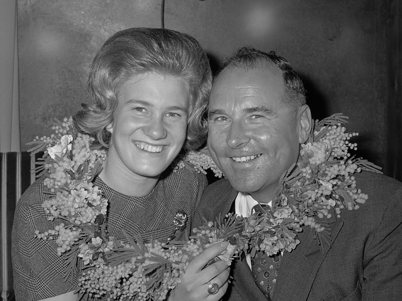 Sjoukje Dijkstra feestelijk ingehaald in Amsterdam. Sjoukje Dijkstra en Gerschweiler 16 maart 1963